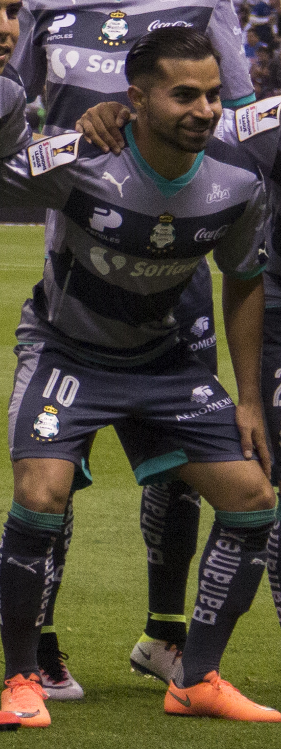 América vs Santos